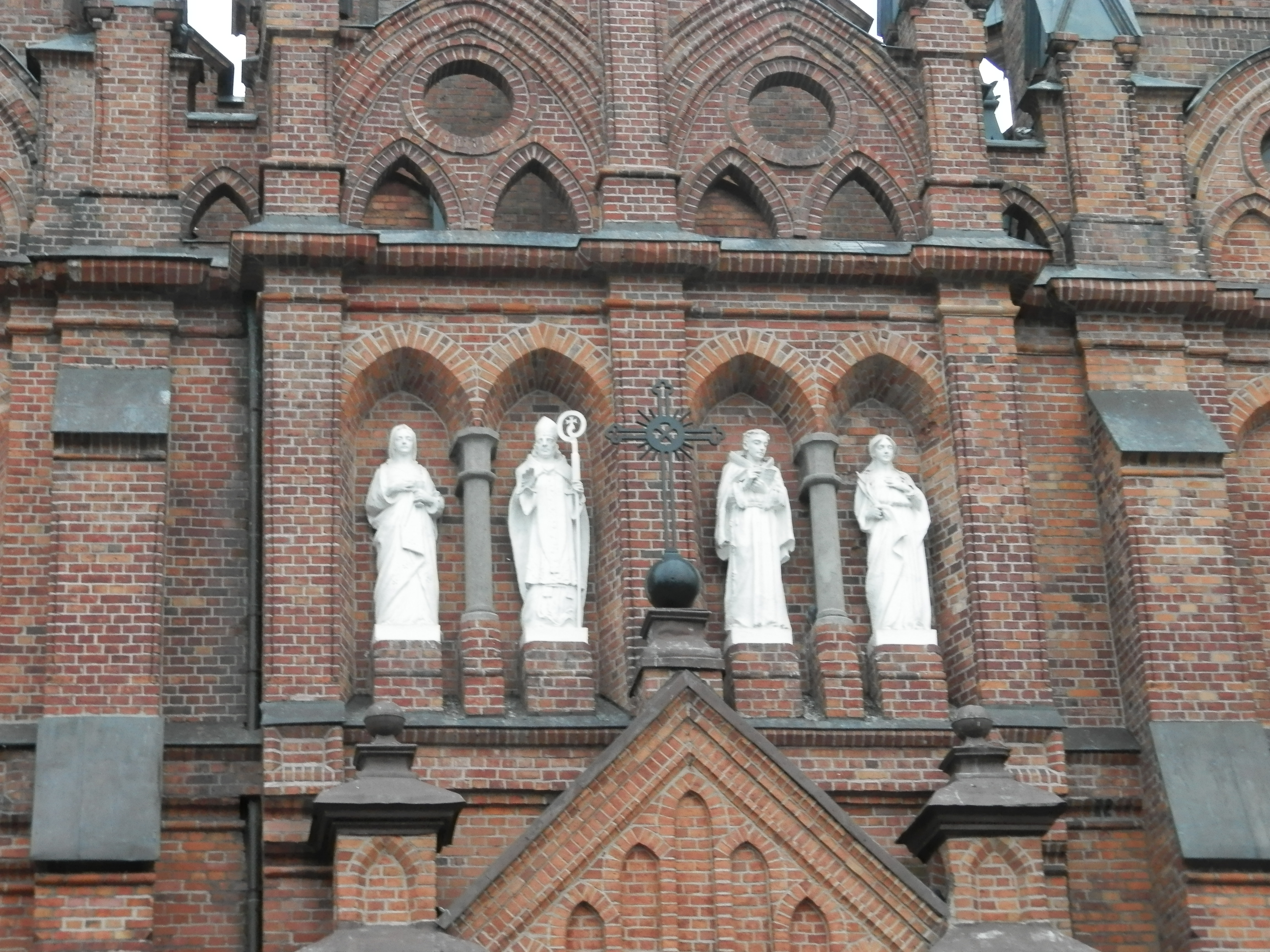 Ciechocinek, Kościół Świętych Apostołów Piotra i Pawła w Ciechocinku Wikidata has entry Q11746373 with data related to this item.